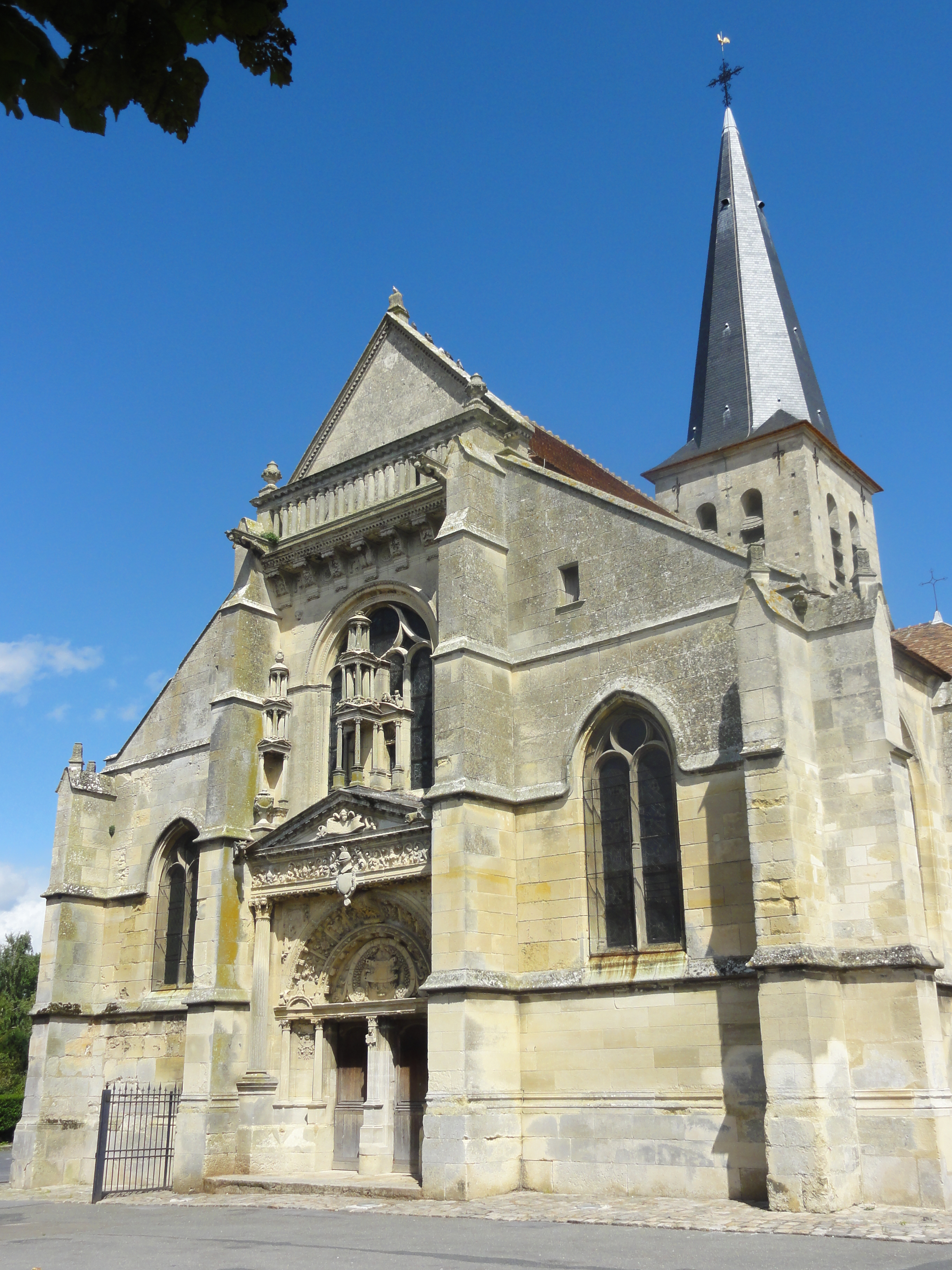 Façade occidentale.